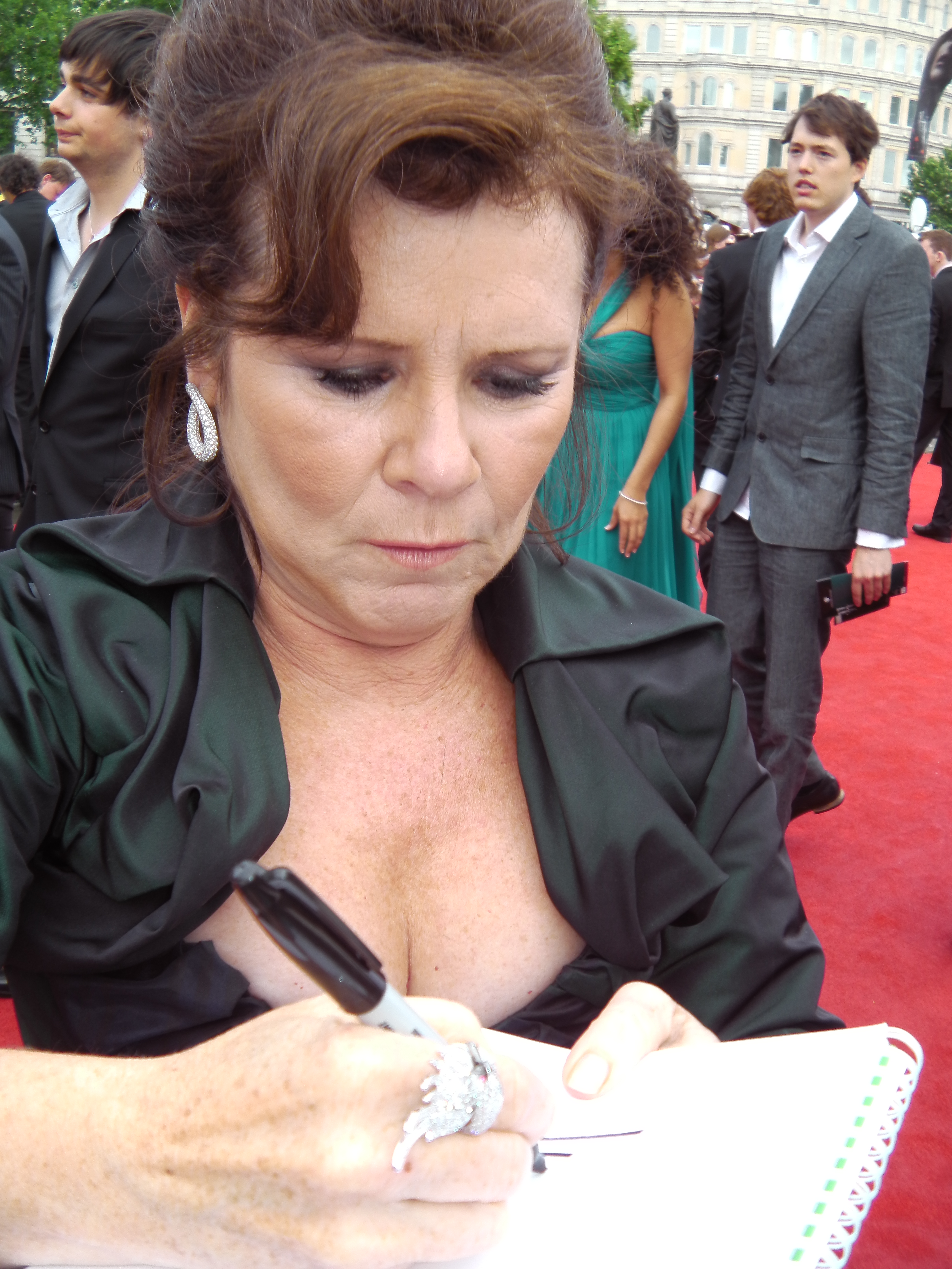 Avant-Première Mondiale d'Harry Potter et les Reliques de la Mort, à Londres, le 7 Juillet 2011